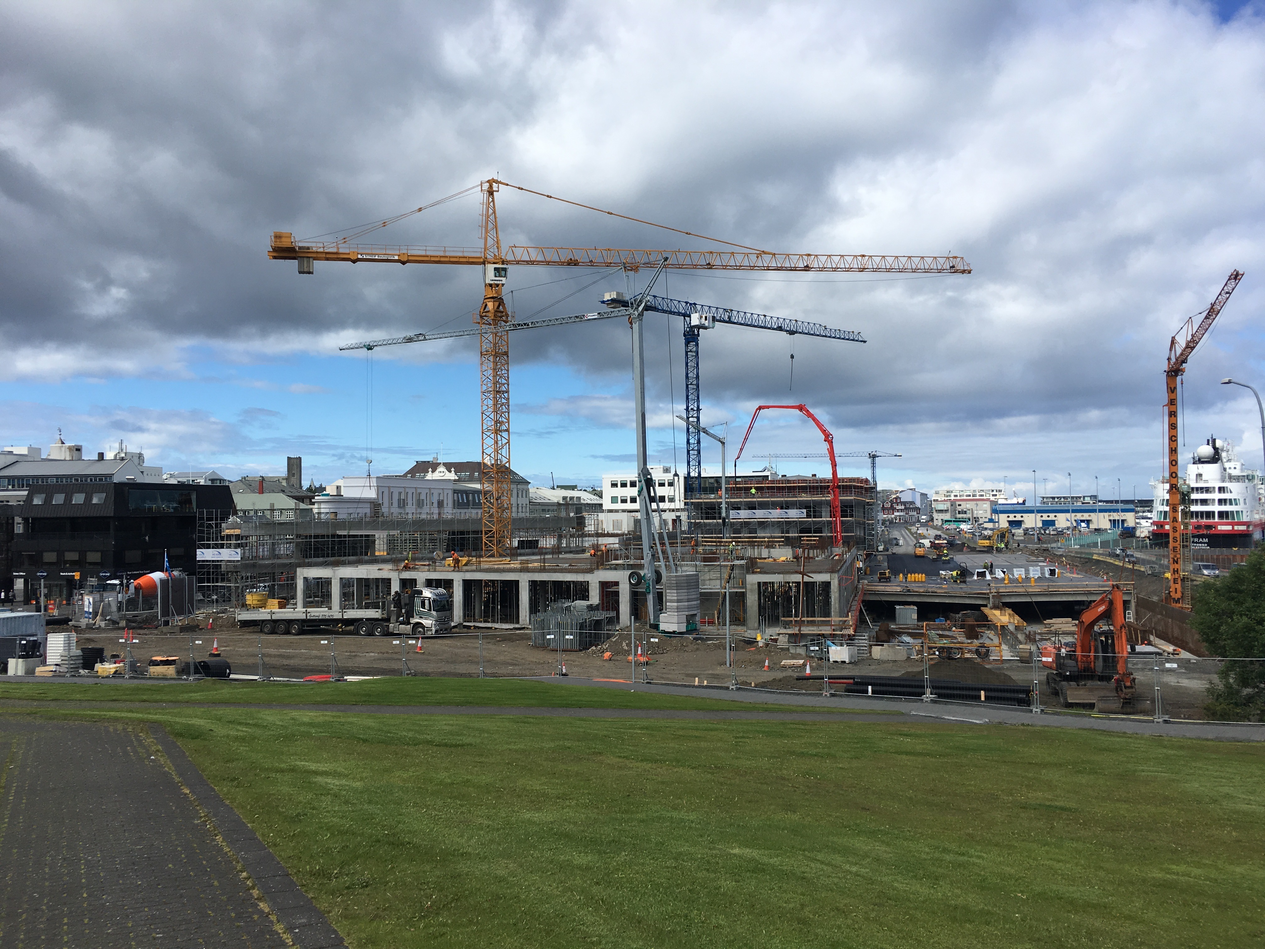 Hafnartorg séð frá Arnarhóli. Staða framkvæmda í júní 2017.